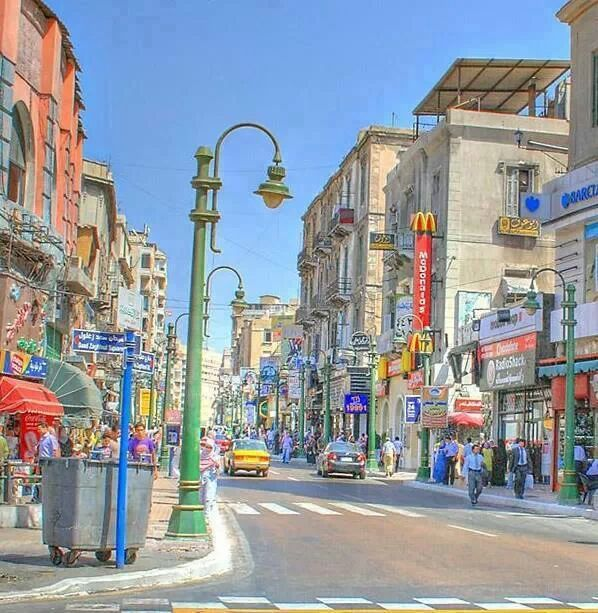 شارع صفية زغلول